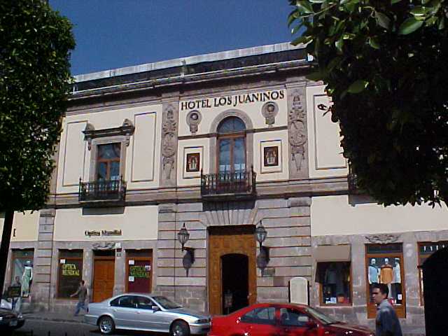 Hotel los Juaninos, en Morelia